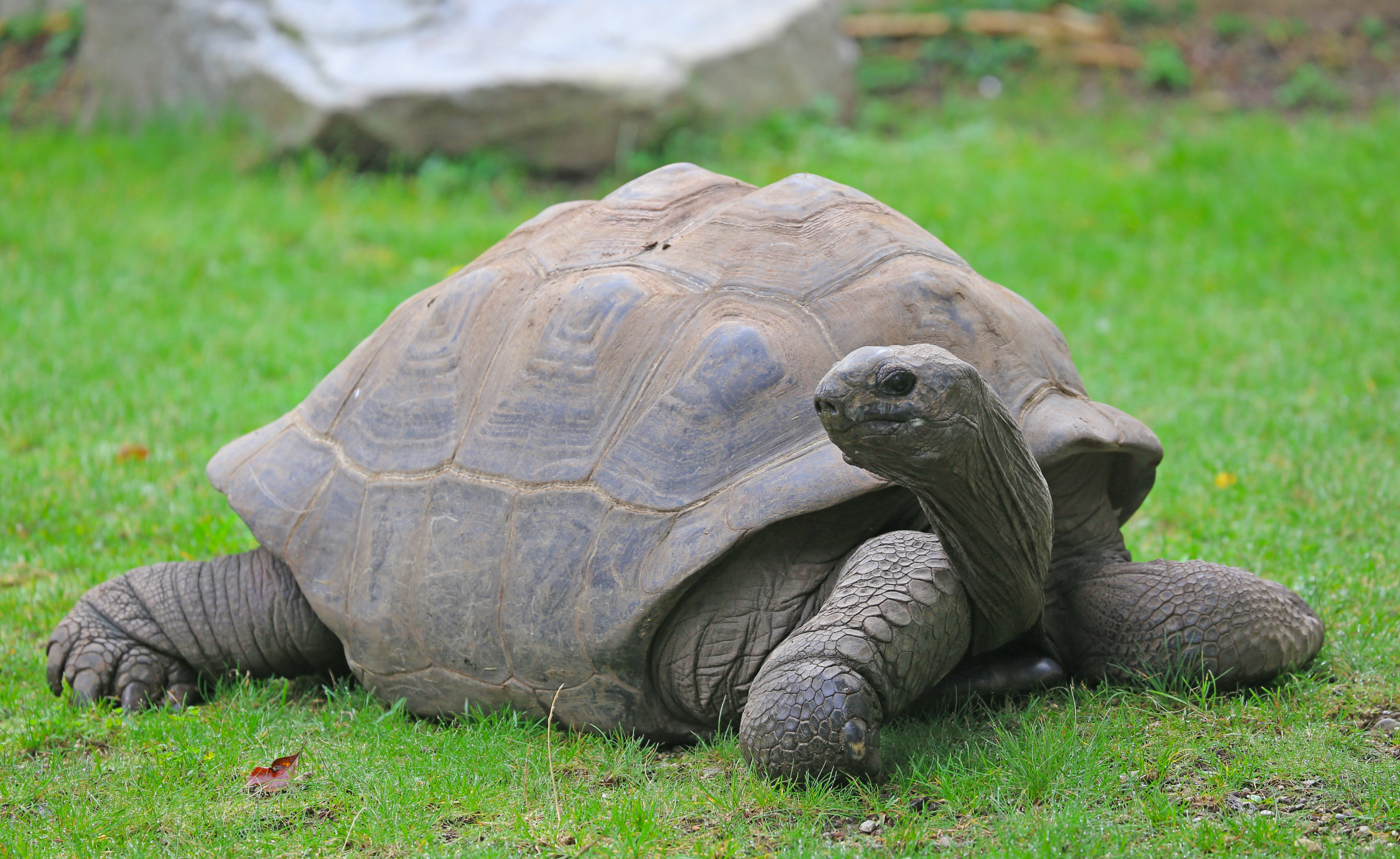 Tierpark Hellabrunn, München Seychellen-Riesenschildkroete (Aldabrachelys gigantea), Tierpark Hellabrunn, München